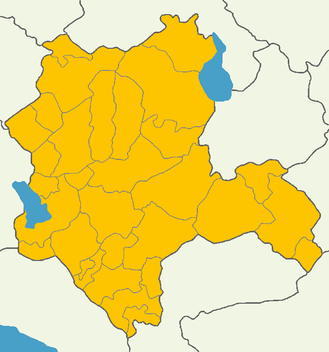 Konya'da 2014 Türkiye cumhurbaşkanlığı seçimi